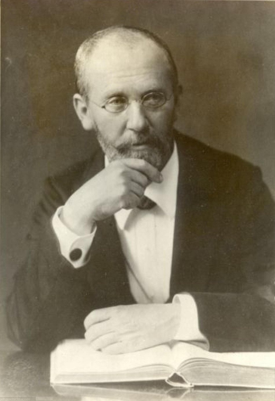 Portrait of Gustav Schreck